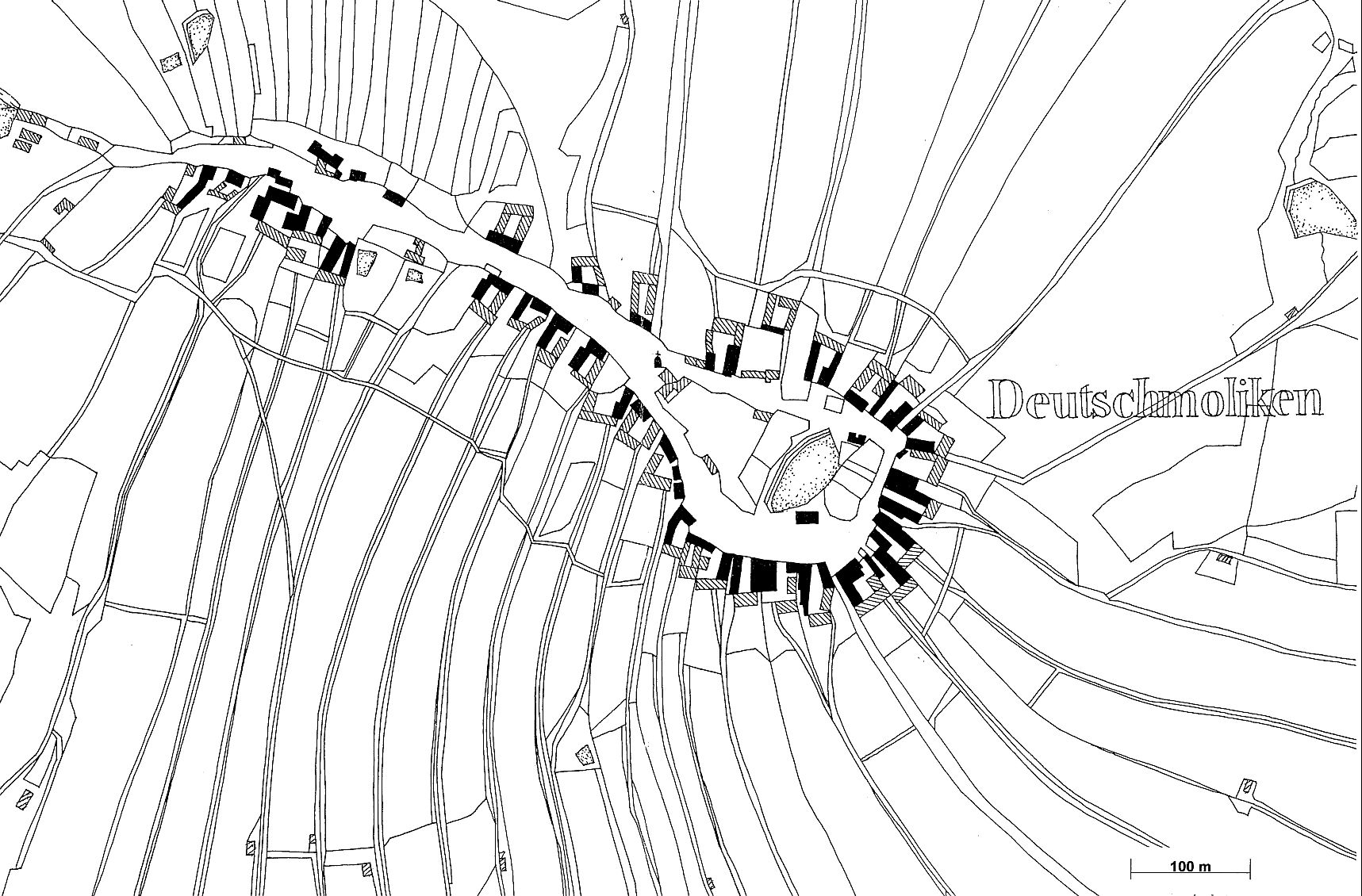 Malíkov nad Nežárkou (okres Jindřichův Hradec), lánová vesnice s paprsčitým uspořádáním plužiny. Situace podle katastrální mapy z roku 1828.